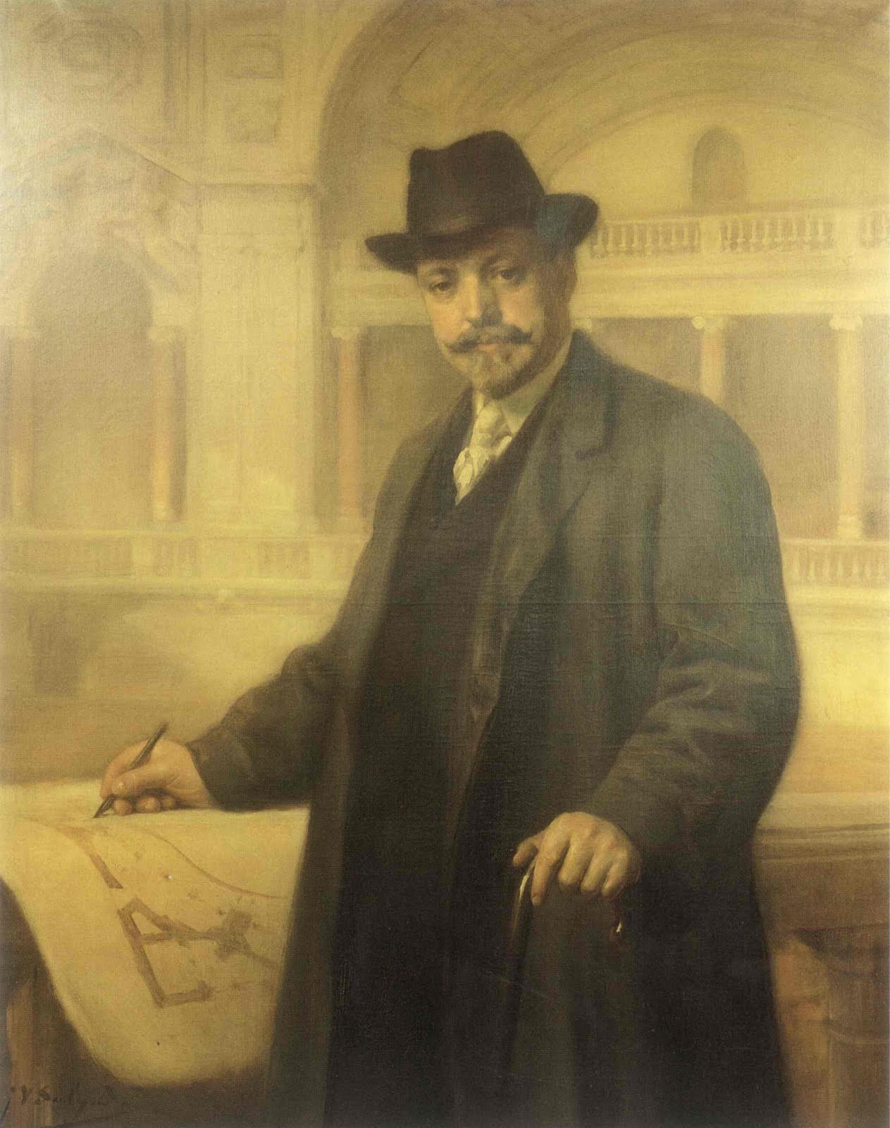 Miguel Ventura Terra (1866-1918)